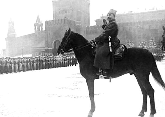 Командующий военным парадом С.М. Буденный. Москва, Красная площадь. 7 ноября 1941